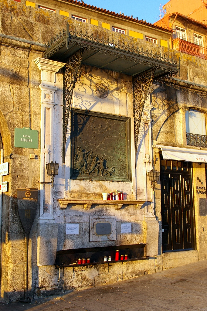 "Alminhas da Ponte" monument in Porto, Portugal